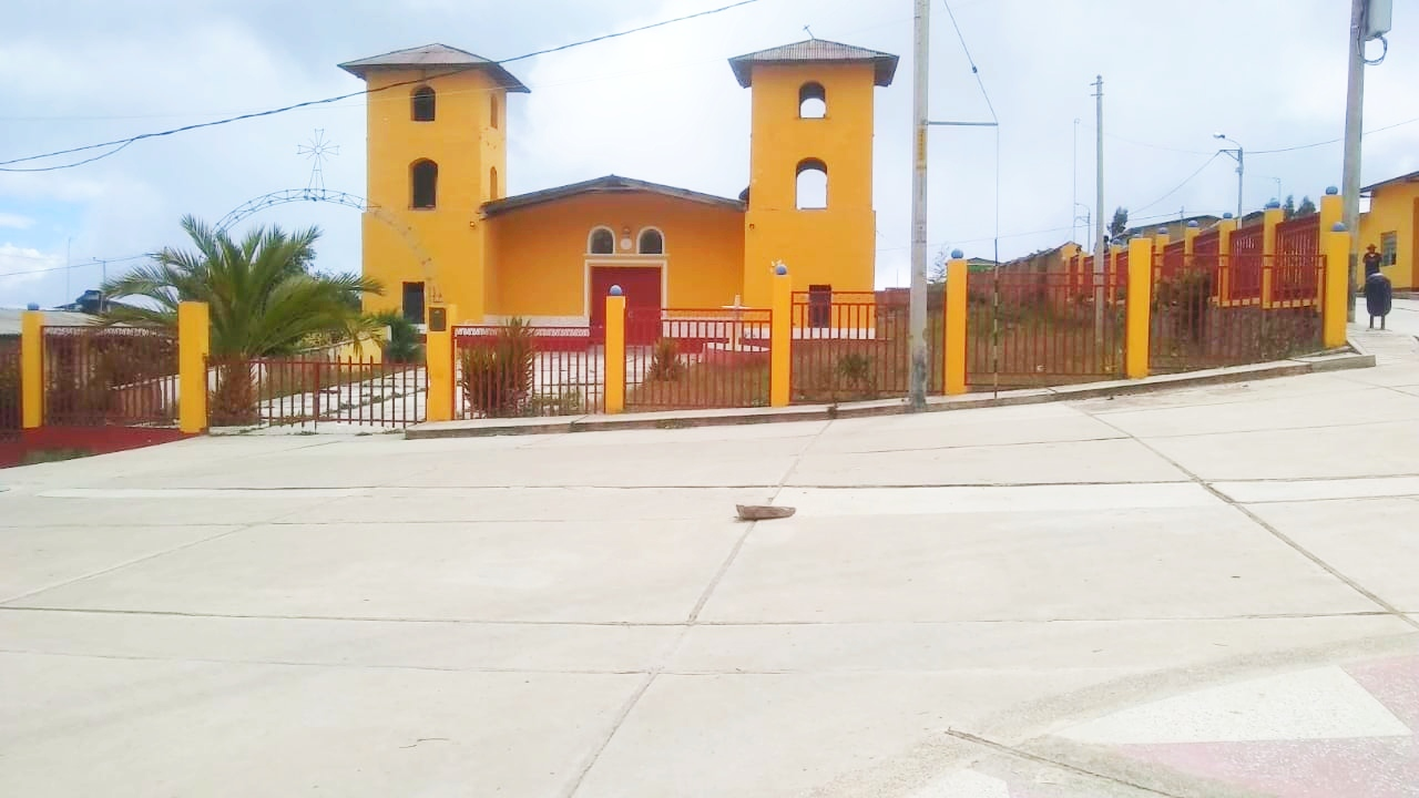 fachada de la iglesia matriz de Pampas Grande